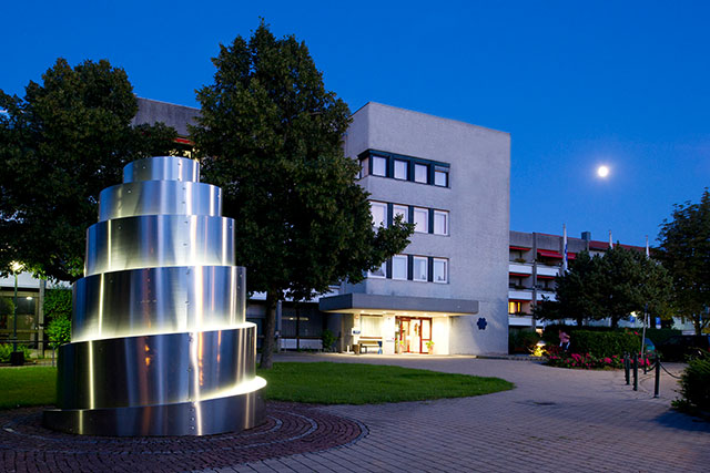 KWA Stift Rottal, Pflegestift in D-94086 Bad Griesbach, Max-Köhler-Straße 3